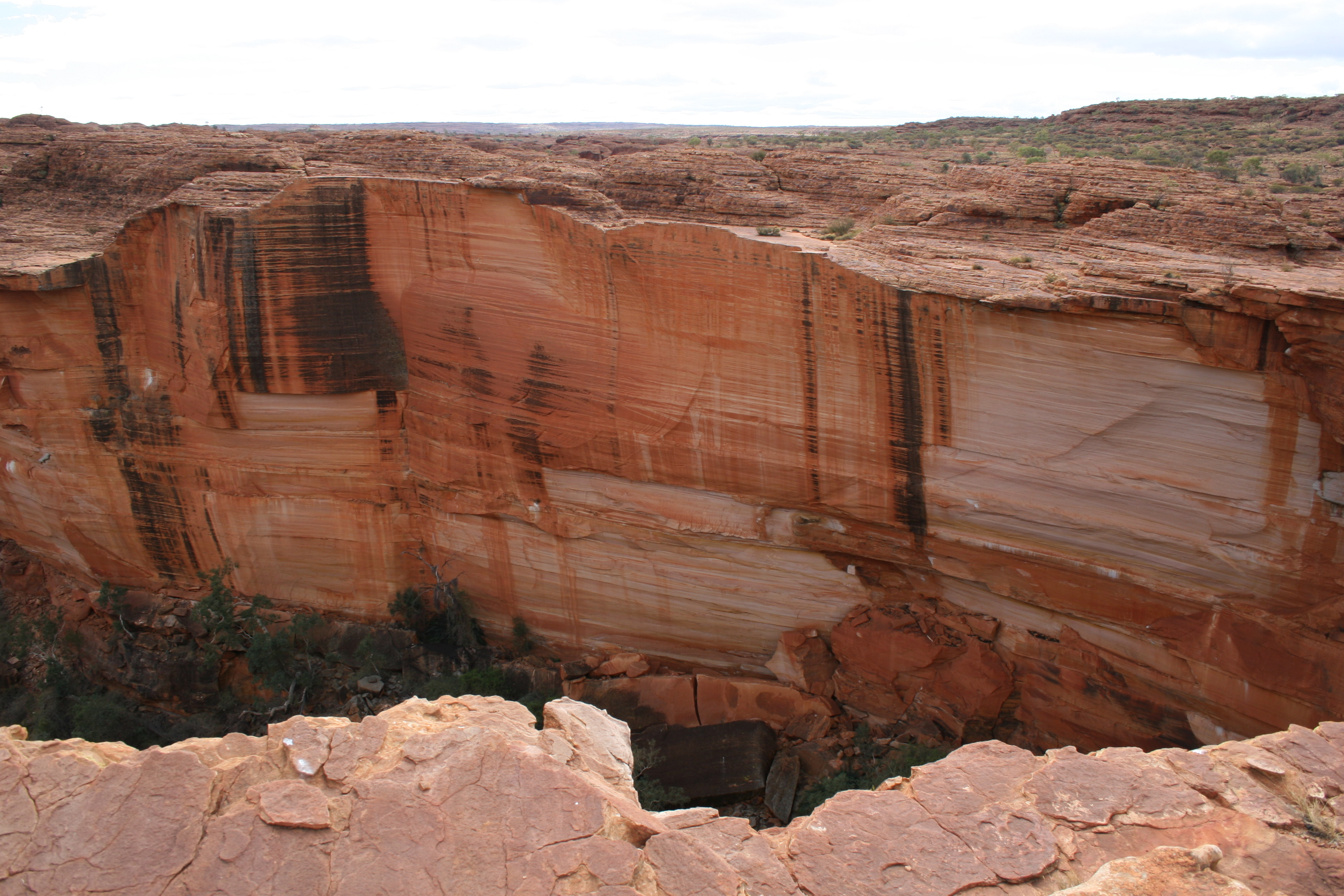 Kings Canyon: Felsabbruchwand. Sie stürzte vor 60 Jahren ab und hinterließ diese Wand